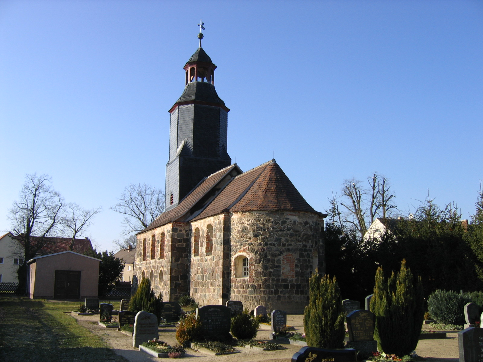 Dorfkirche Kaltenborn, Niedergörsdorf, Landkreis Teltow-Fläming, Brandenburg, Gesamtansicht